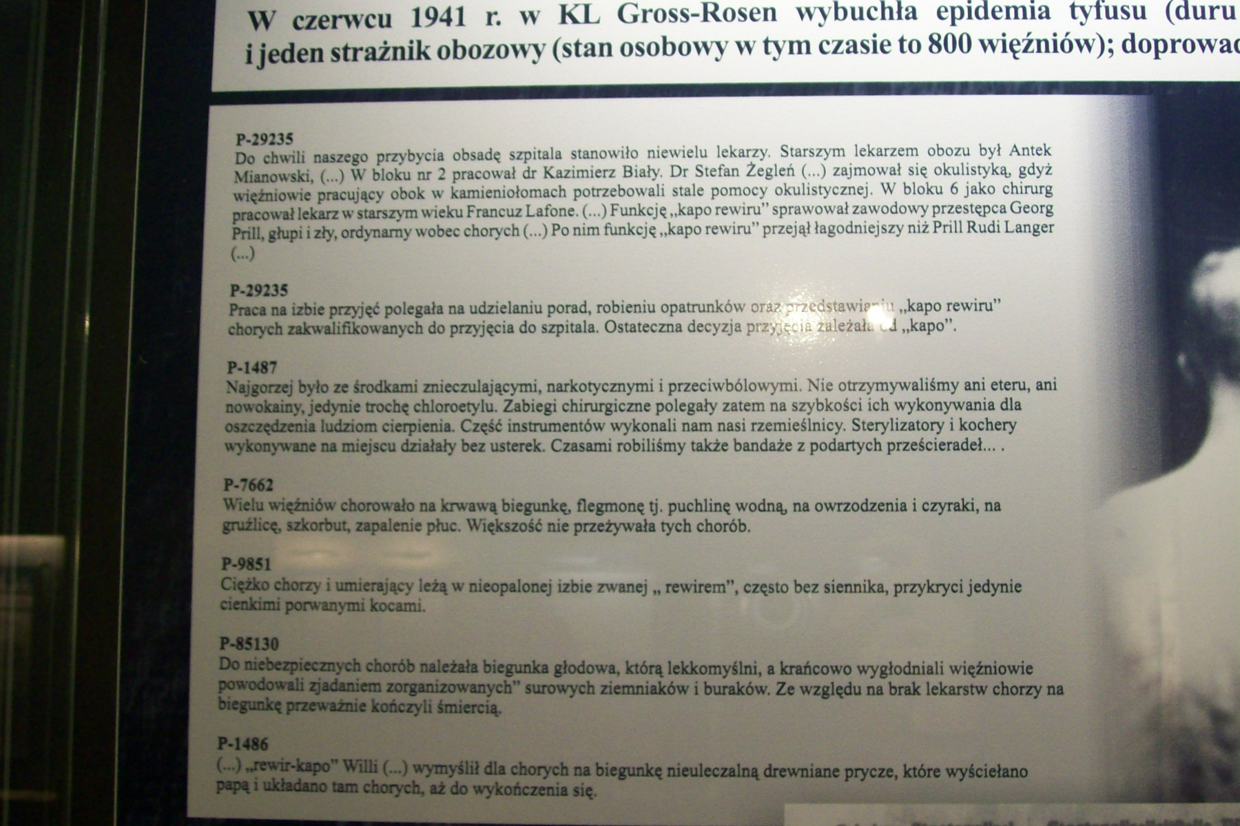 Informacje znajdujące się w muzeum KL Gross-Rosen w Rogoźnicy na Dolnym Śląsku